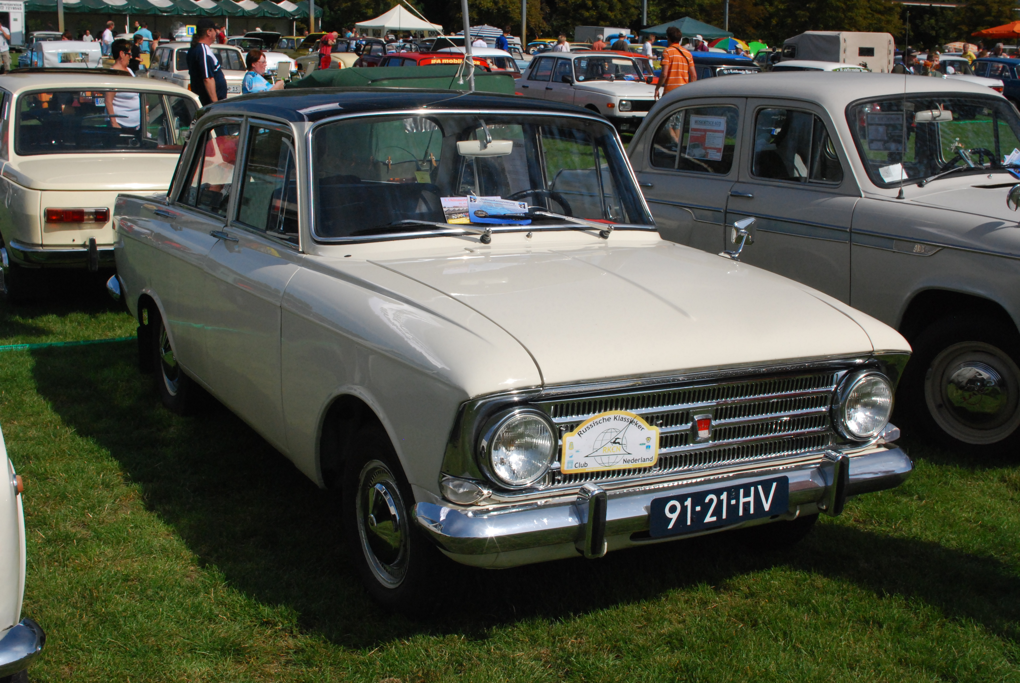 Fotos von der OMMMA 2011 am 03.09.2011 im Magdeburger Elbauenpark